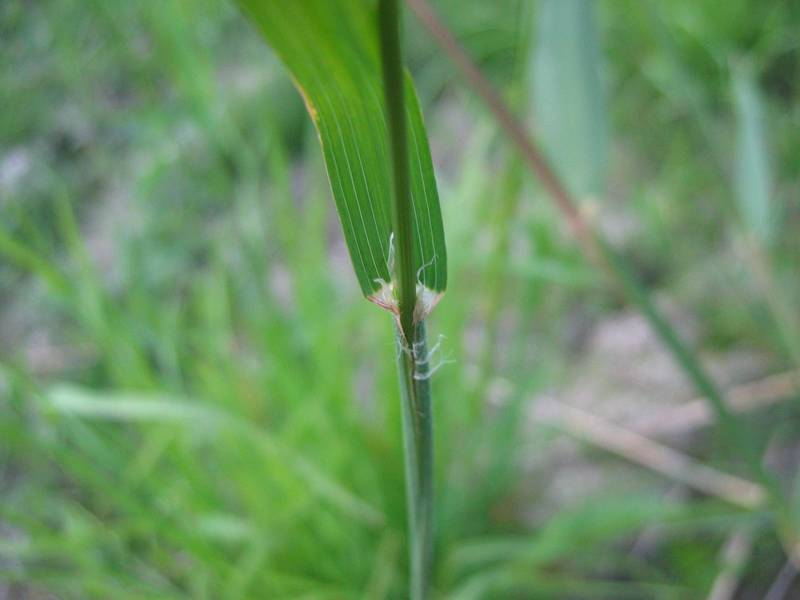 Blatt des Gewöhnliches Knäuelgrases Dactylis glomerata